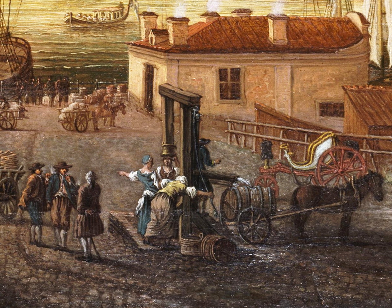 Utsikt från Brunnsbacken över Saltsjön, detalj av brunnen